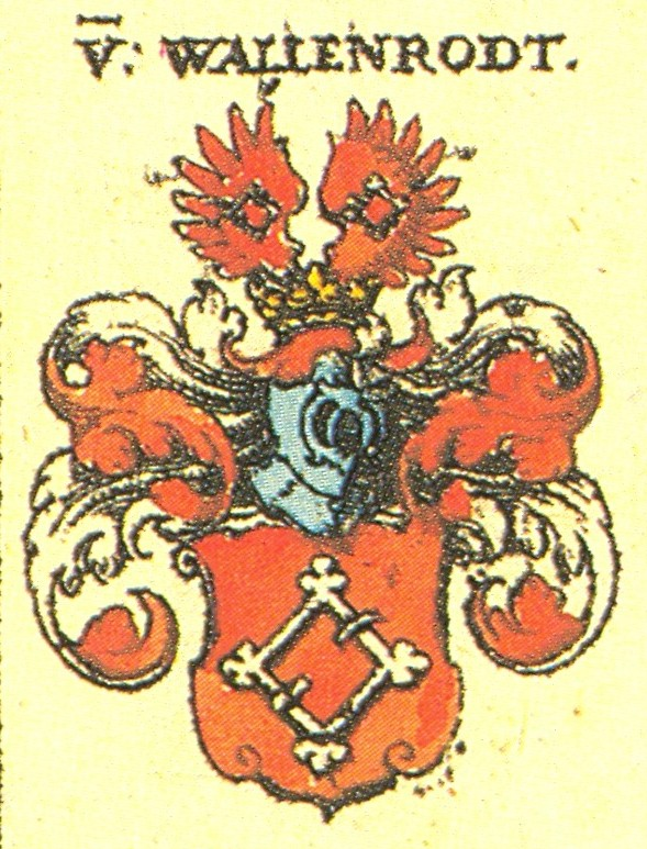 Ritterschaft und Adel in Franken Wappen der fränkischen Adelsfamilie Wallenrode